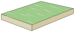 Autor: Usuario:Lmb